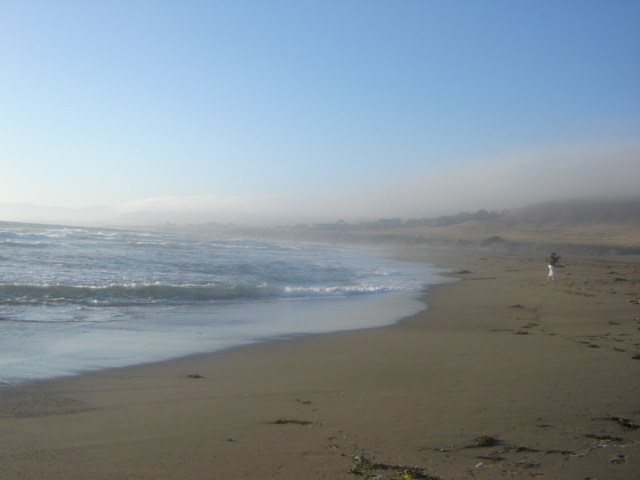 Bodega Bay